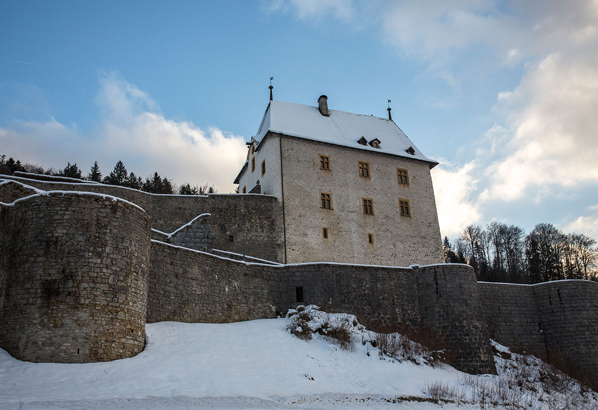 Château et Musée de Valangin